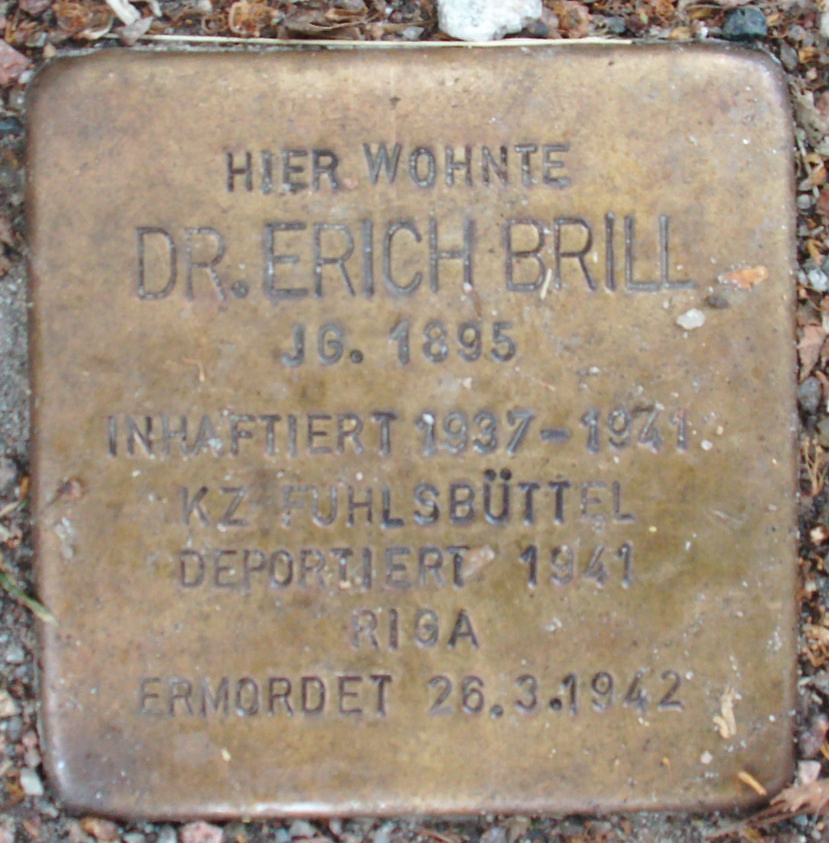 Stolperstein für Erich Brill